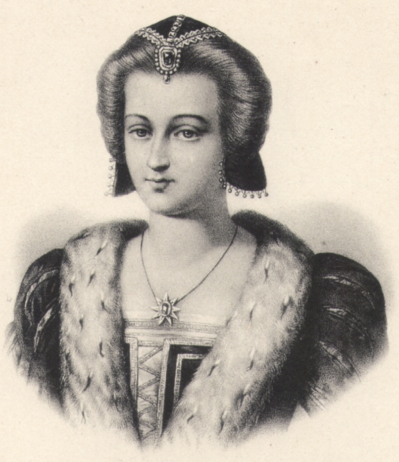 Valentina Visconti, detta Valentina di Milano, moglie di Luigi d'Orléans